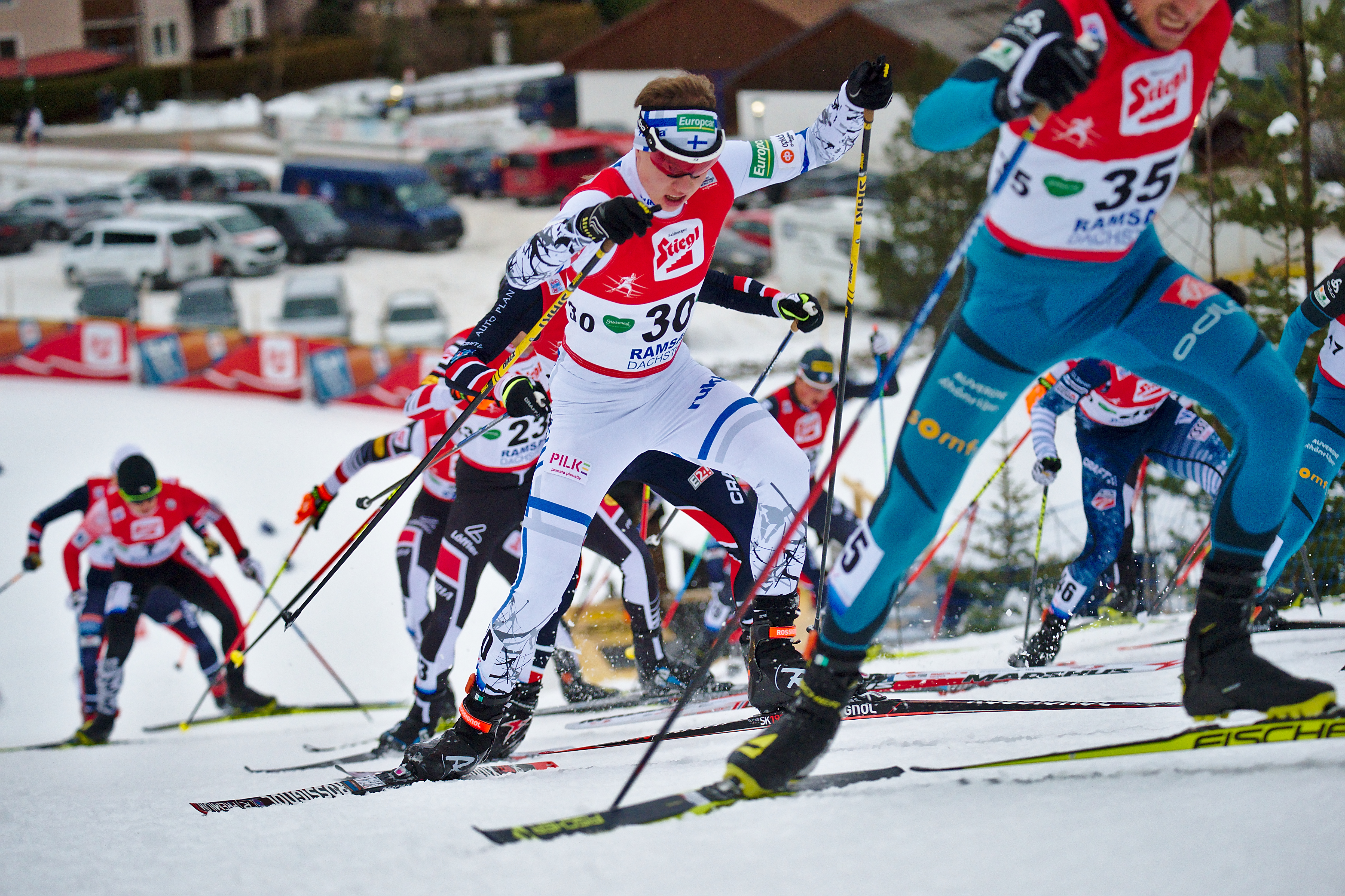 10km Gundersenlauf am Sonntag, 18.12.2016